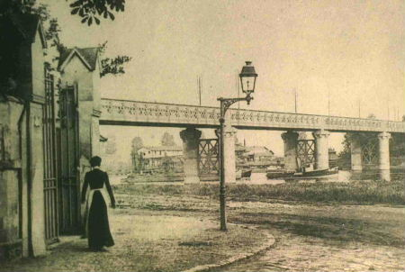 Le pont d’Argenteuil reconstruit